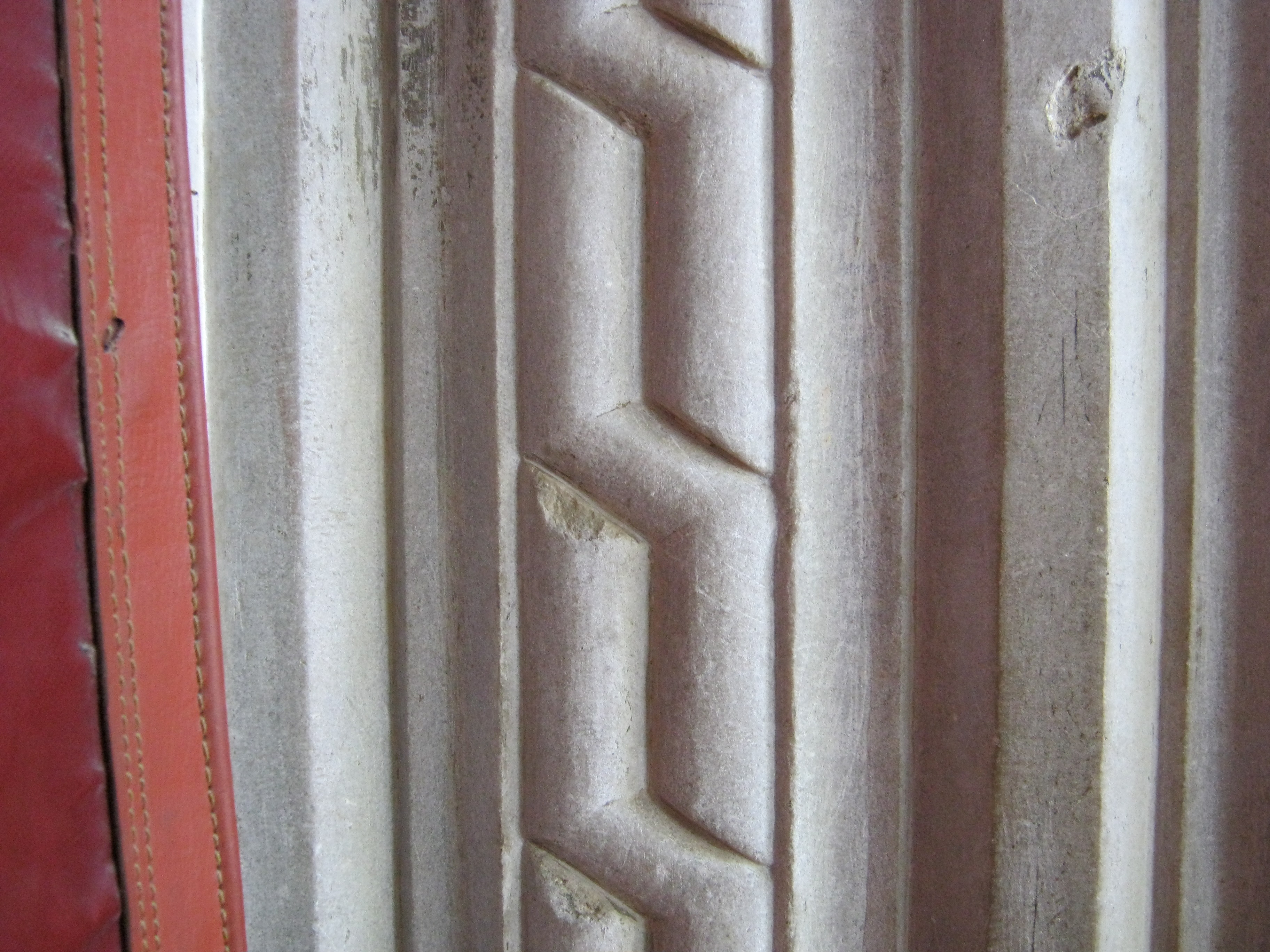 Yıldırım Bayezid Camii Bursa